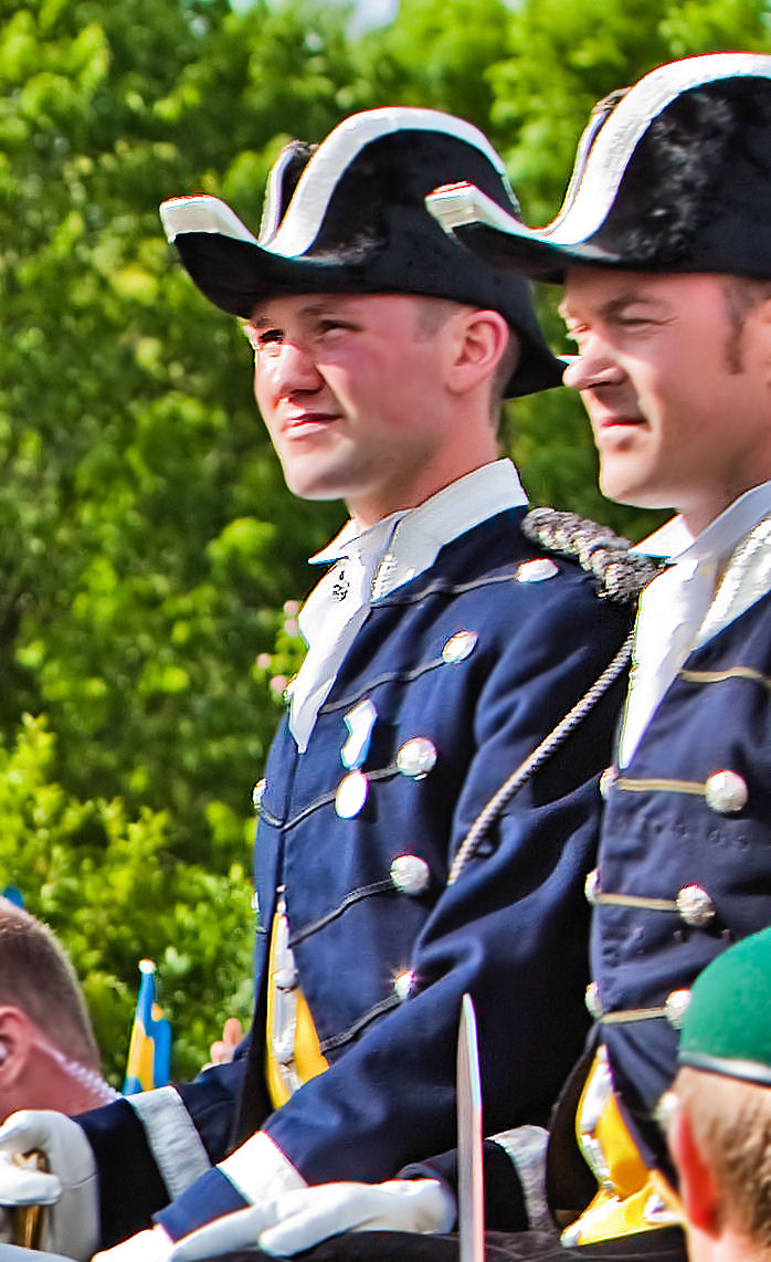 Hof van Zweden huwelijk Victoria